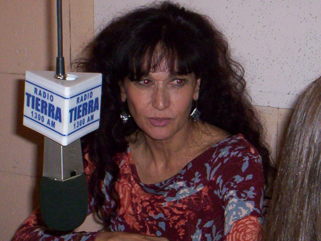 Izquierdo Femenino:Shlomit Baytelman